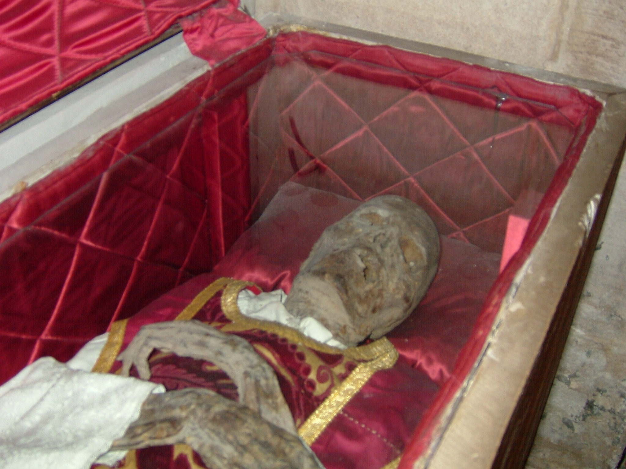 Momia del Chantre de Calahora en Miranda de Ebro.